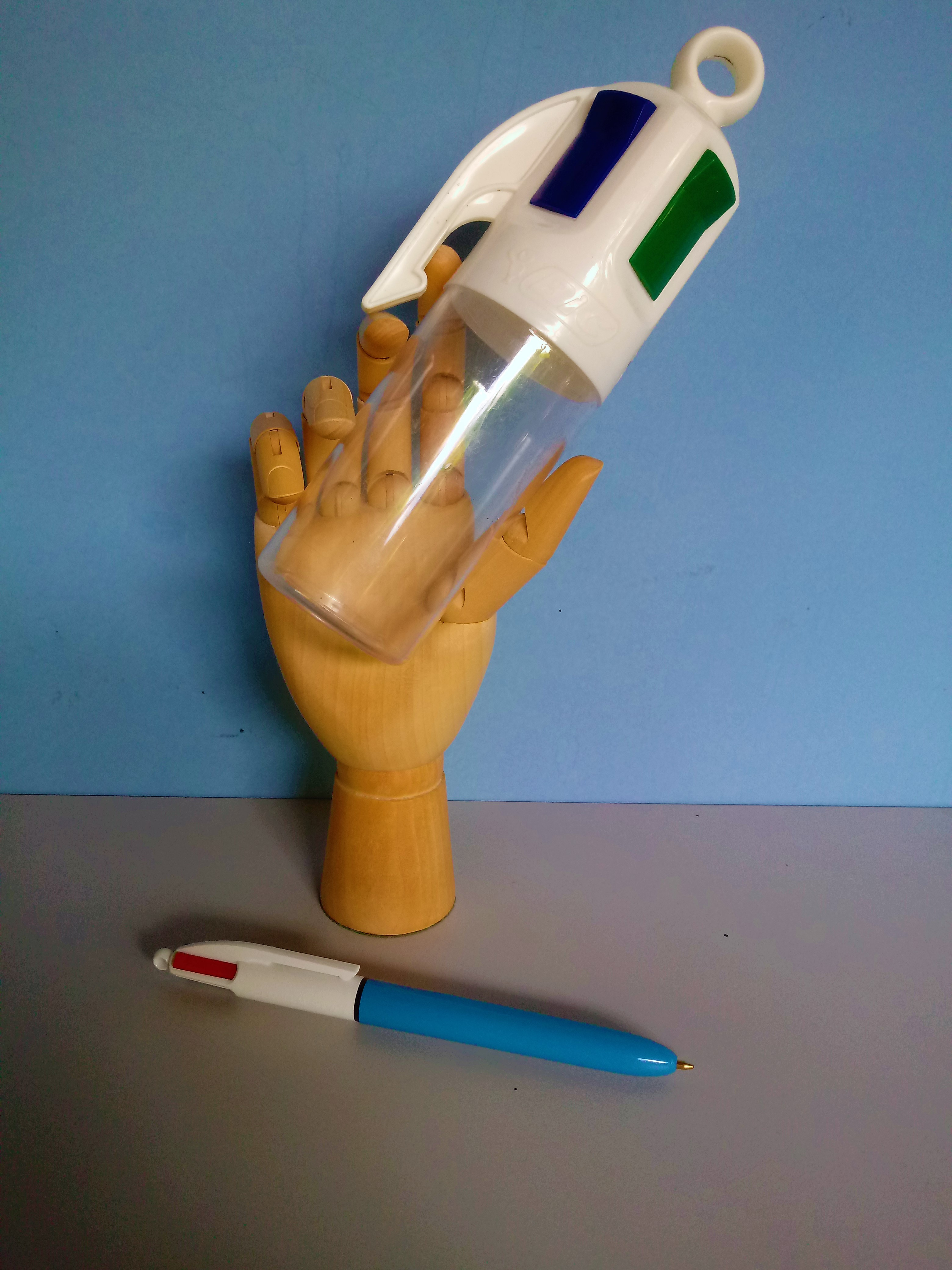 Material e caneta da BIC.